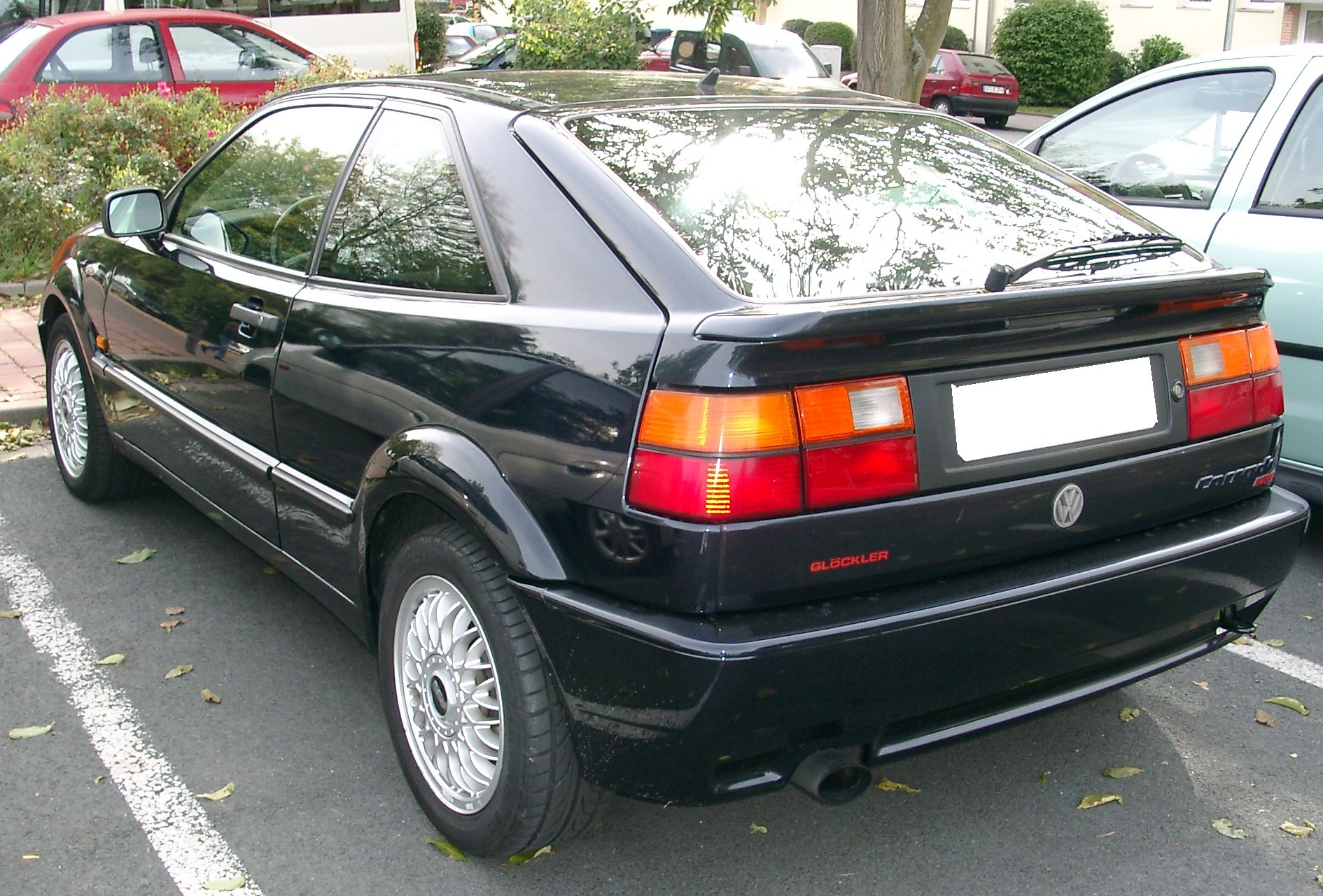 VW Corrado